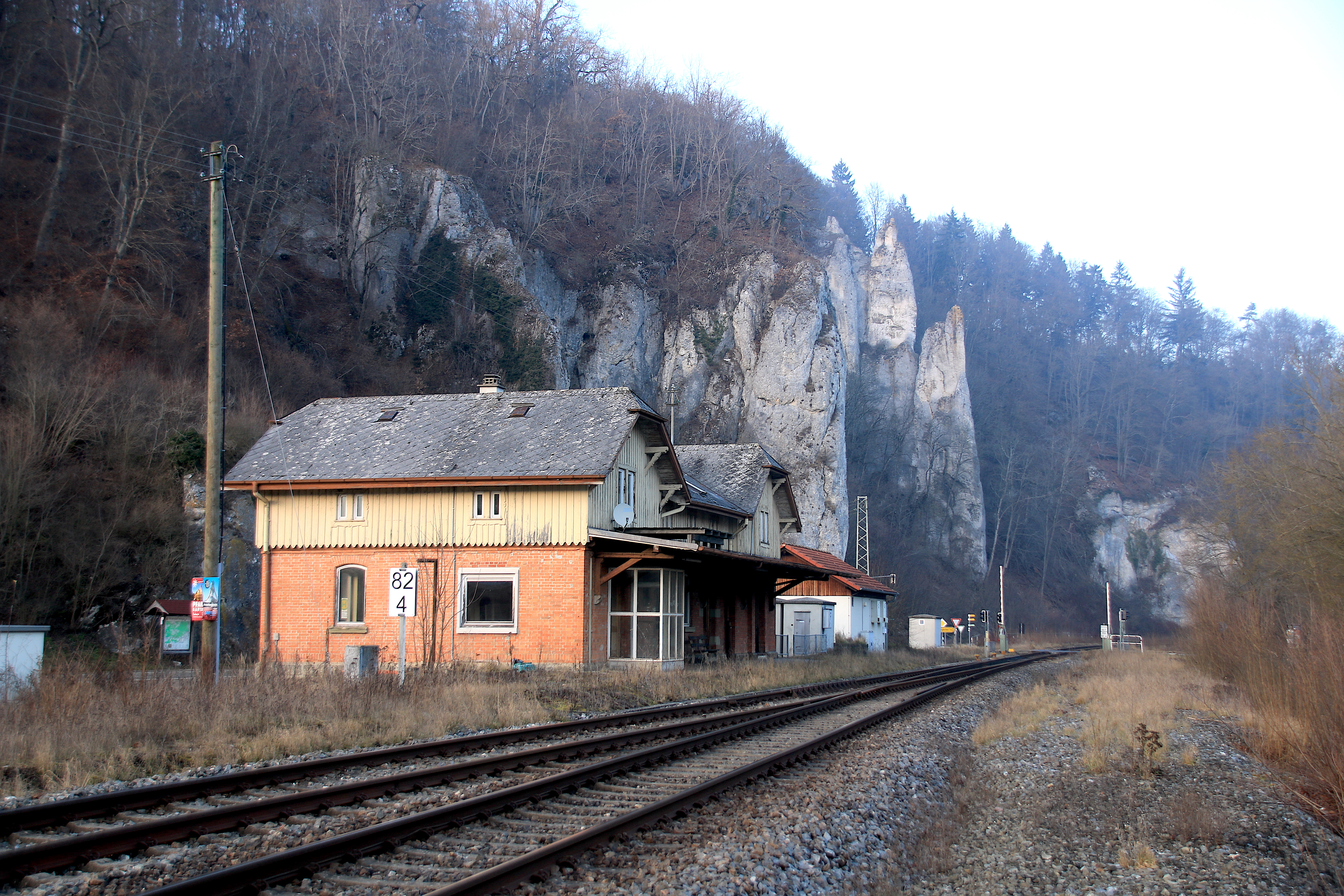 Inzigkofen Bahnhof (2020)